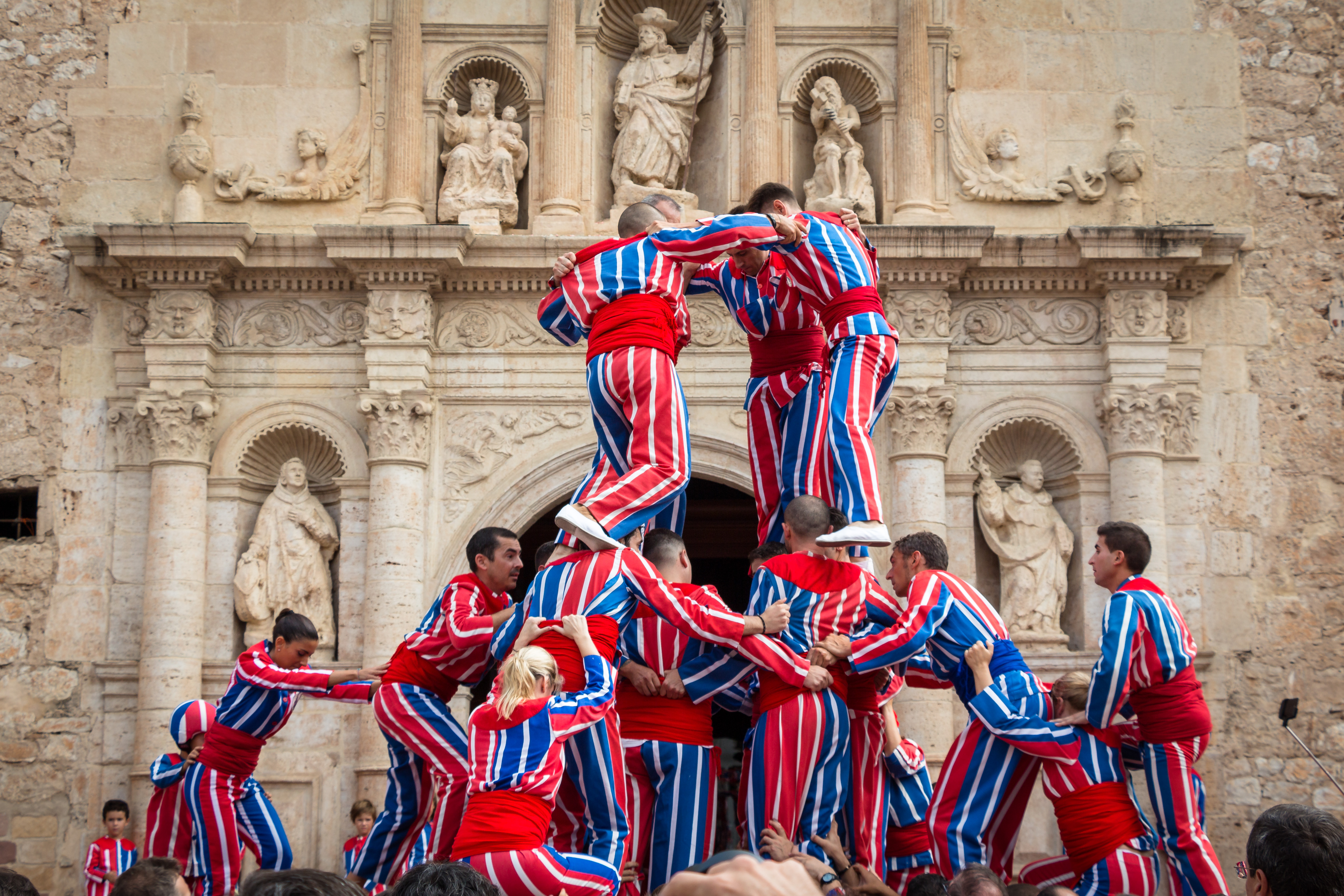 En la Processoneta del Matí, los miembros de la Muixeranga de'Algemesí se disponen a construir una de las tradicionales torres humanas. This is a photography of a Folklore festival in Spain (Wikidata id Q3290365).